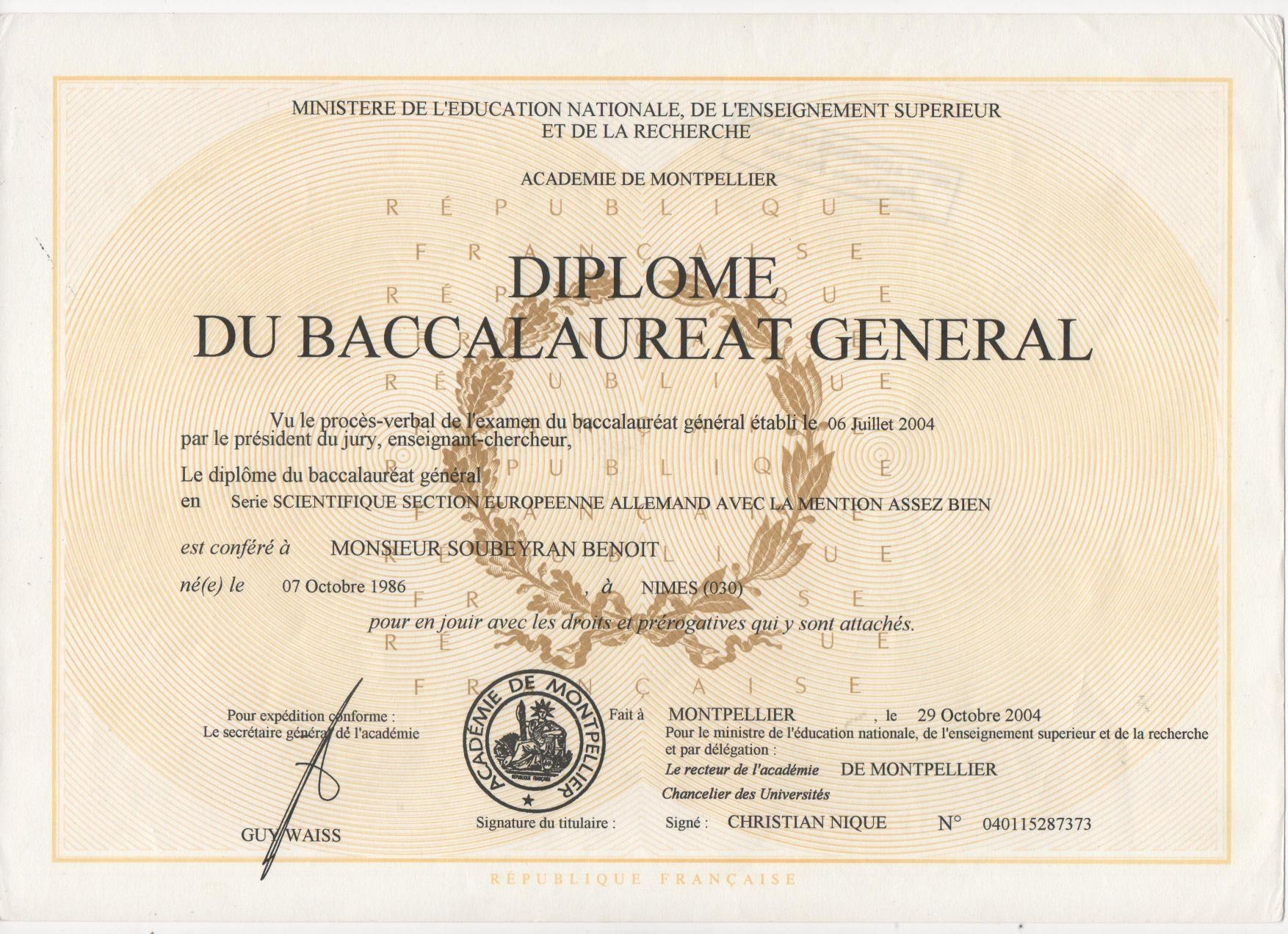 pour un Modèle Image formée à partir de l'image classroom.jpg sur Wiki en